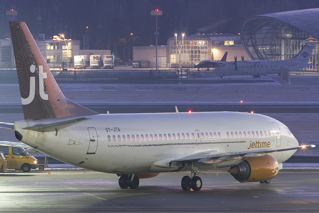 OY-JTA B737 Jettime salz night 100109 maarten-sr